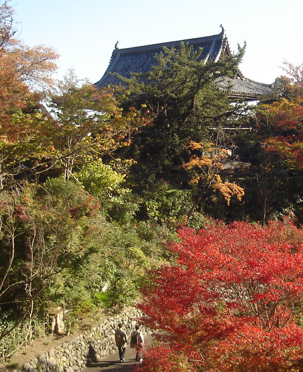 Yoshiminedera sanmon , kyoto japan